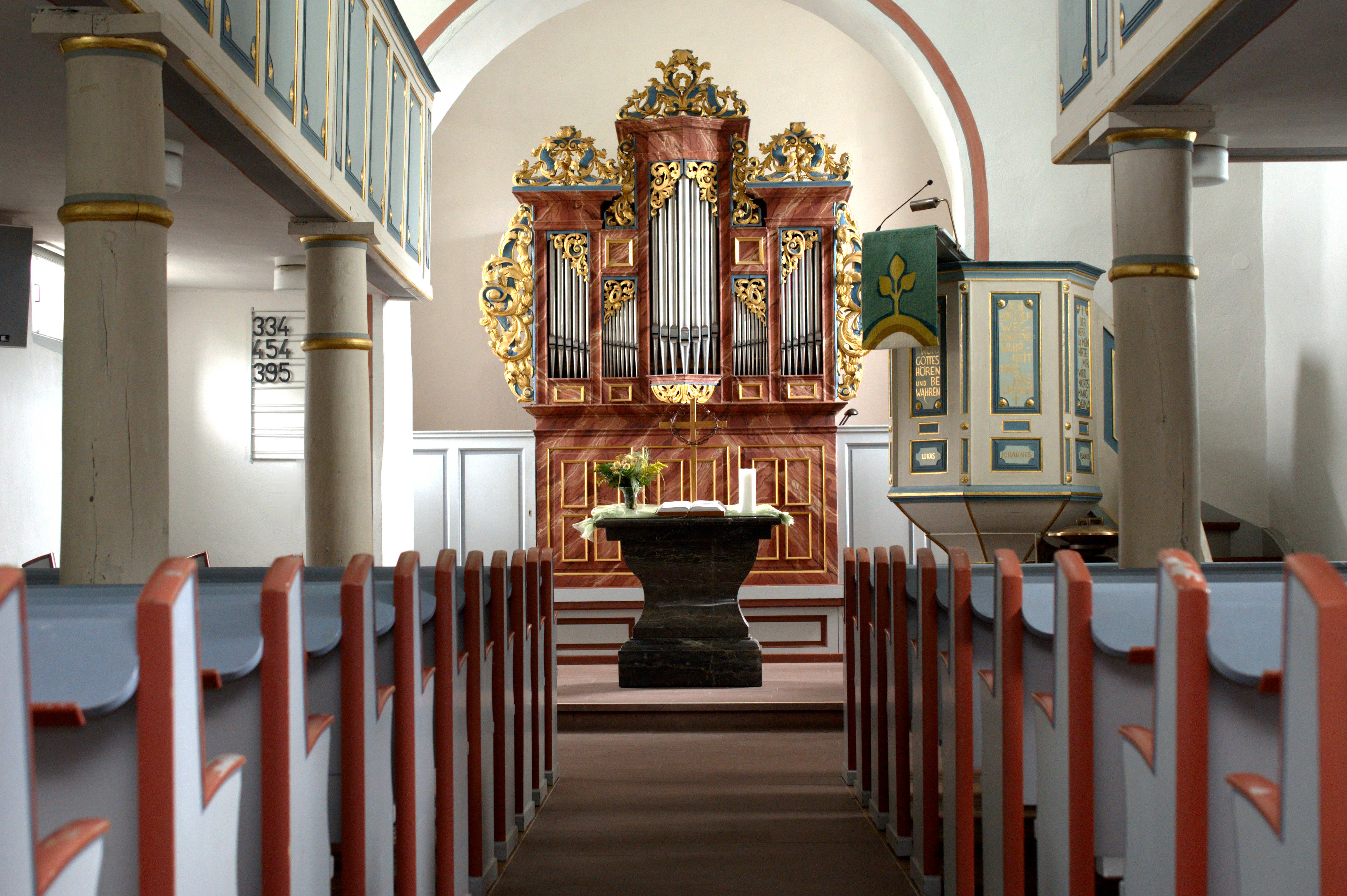 Orgel der Ev. Kirche Niederbiel, Solms, Deutschland